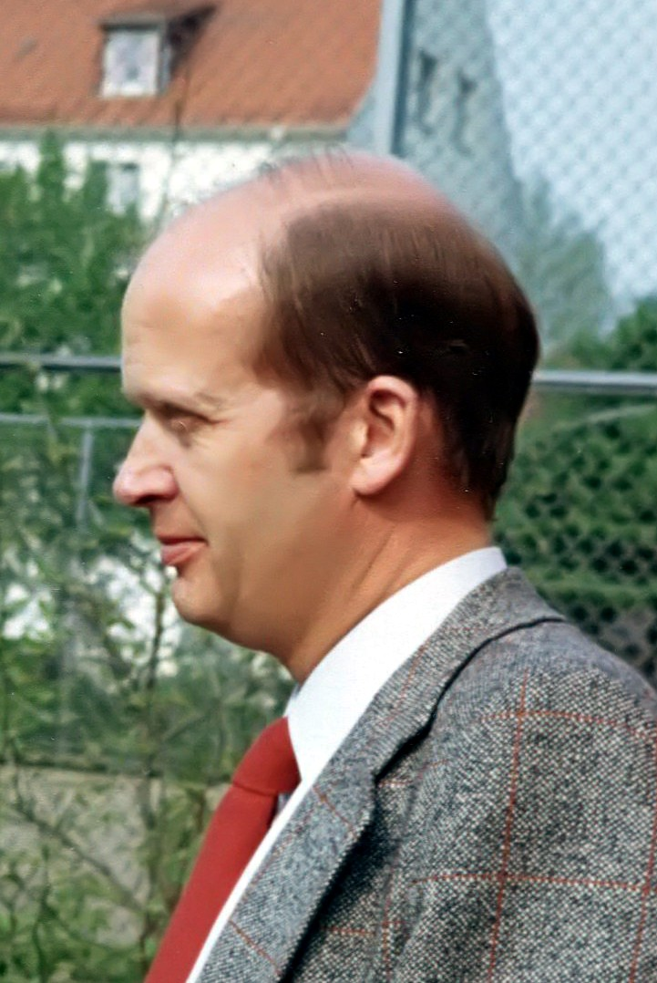 Porträt Frank Dahrendorf